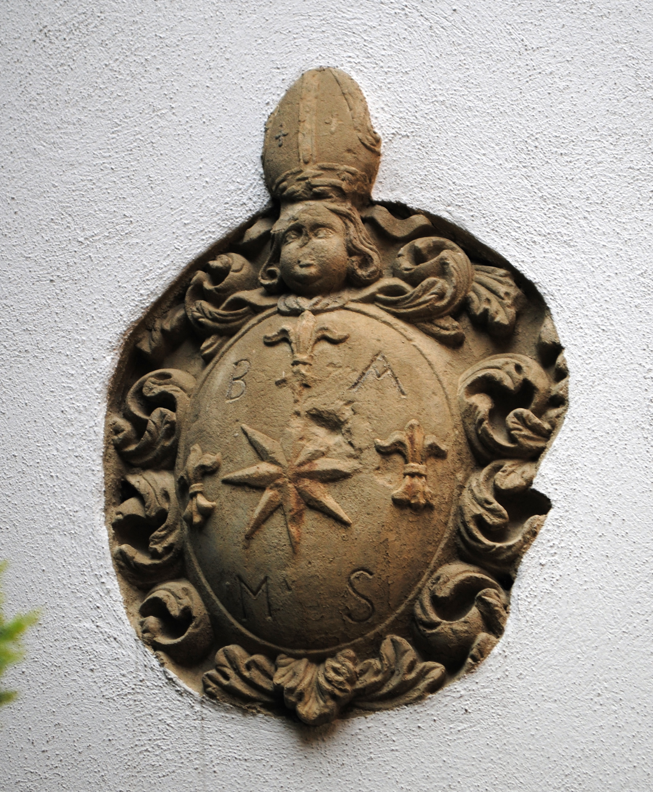 Wappenstein, Nebengebäude Kirche St. Sebastian Reupelsdorf